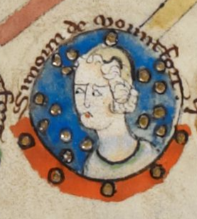 Simon VI of Montfort